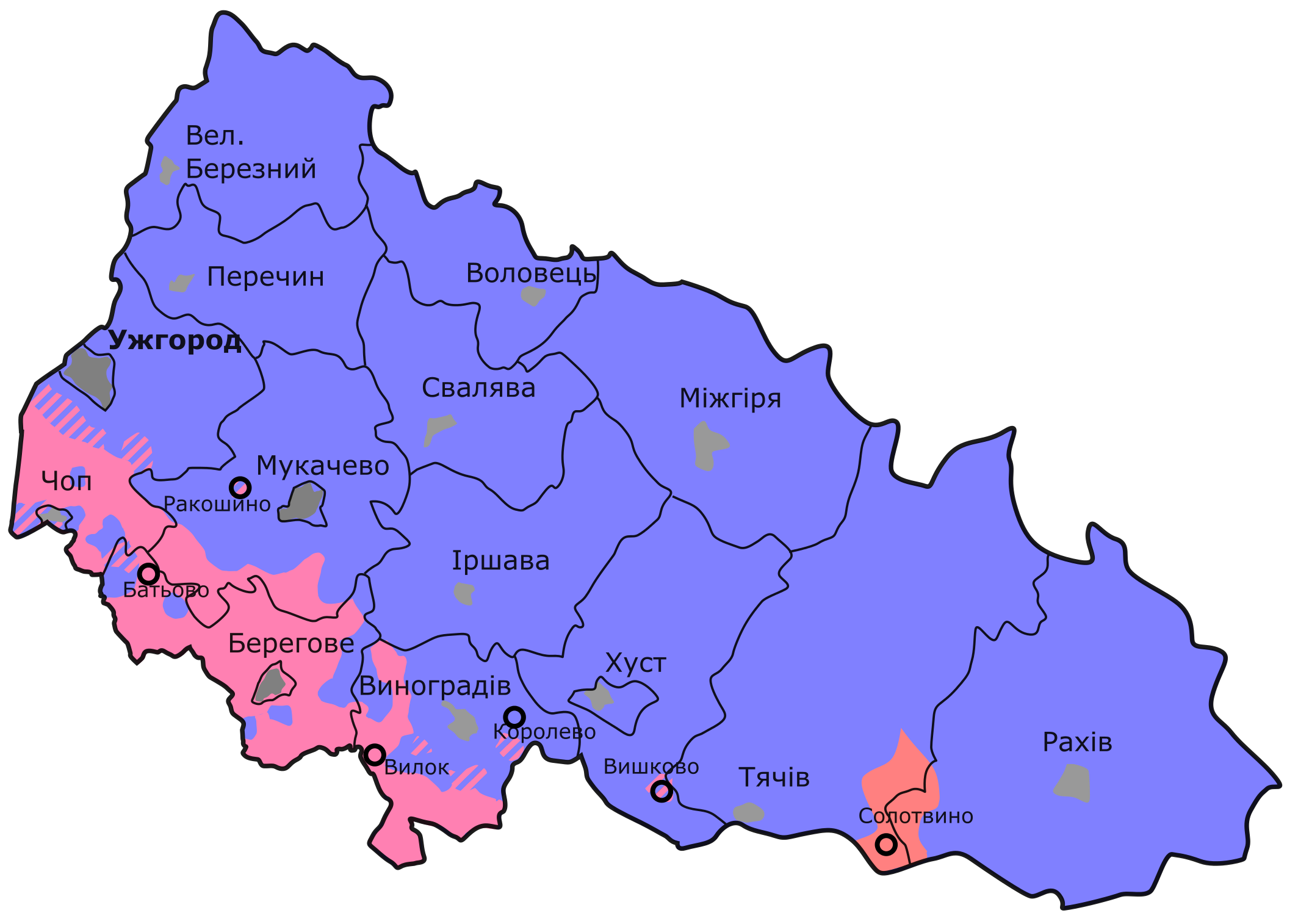 Етнографічна карта Закарпатської області